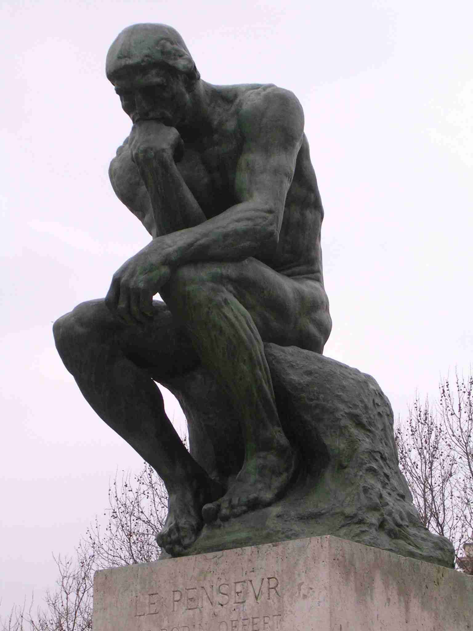 Auguste Rodin: Le Penseur, Hôtel Biron, Jardin du Musée Rodin, Paris VIIe, France.